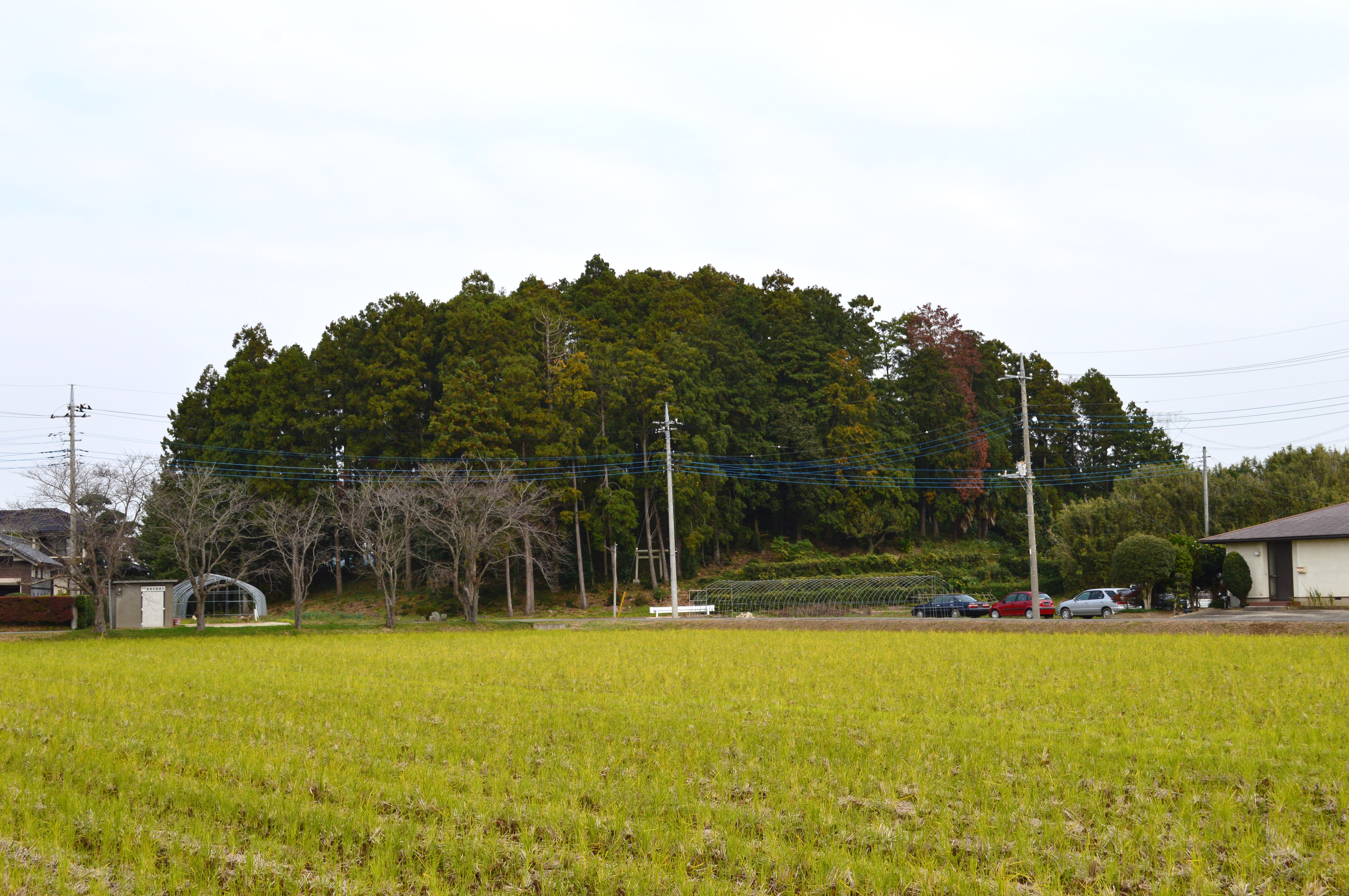 葦間山古墳 全景